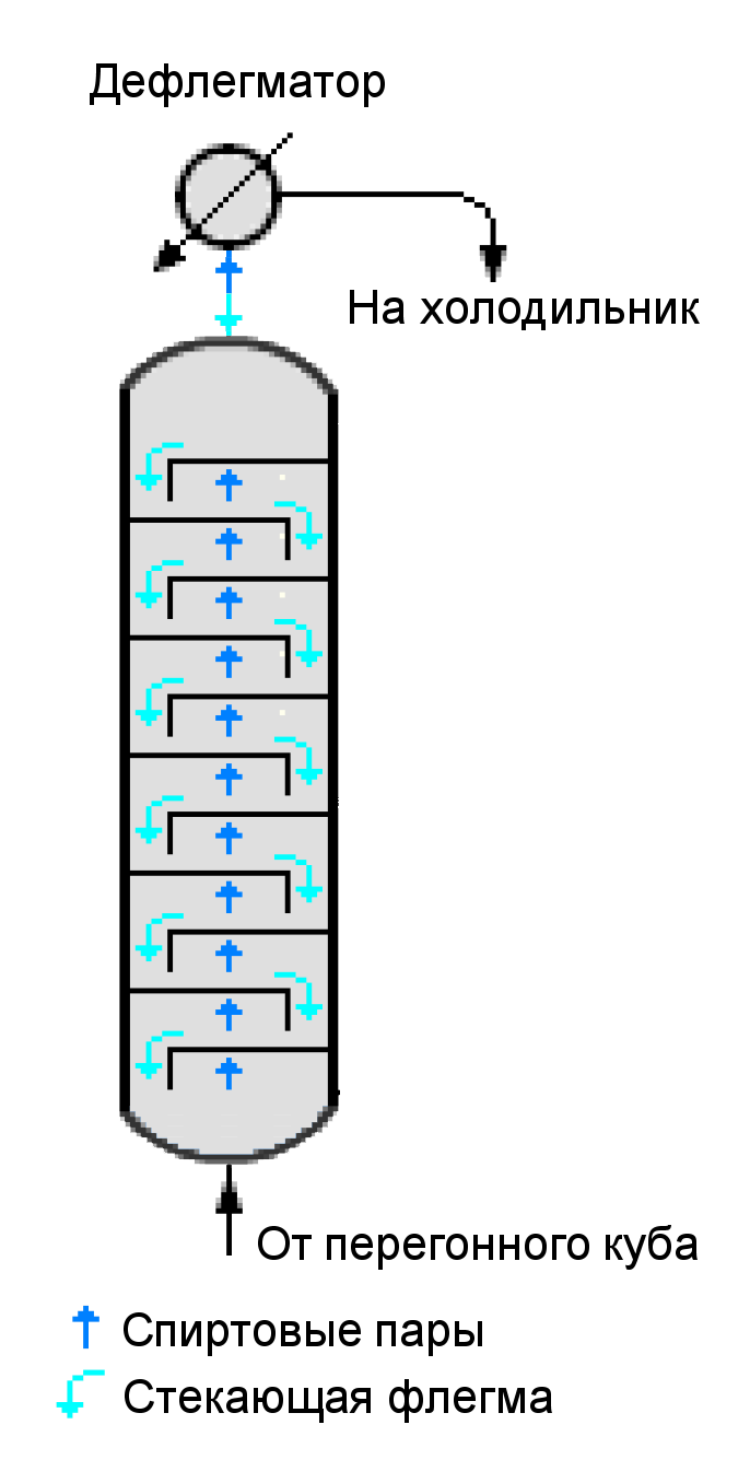 Схема упрощенной ректификационной колонны для самогонного аппарата